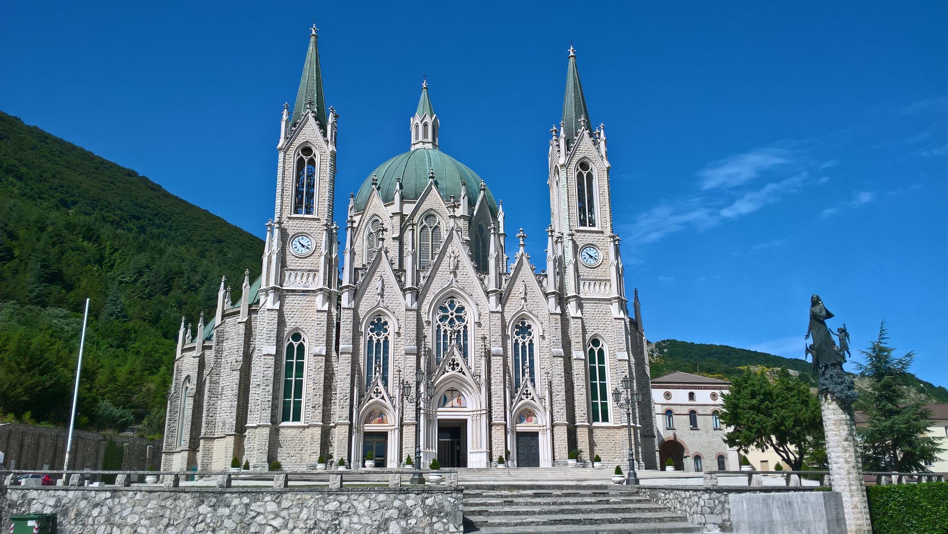 Basilica minore dell'Addolorata